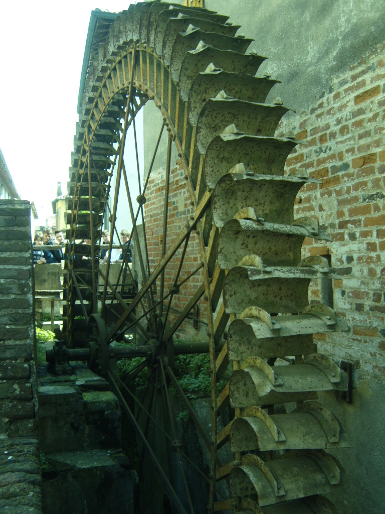 Mulino Sant'Angelo di Soncino, Mantova.